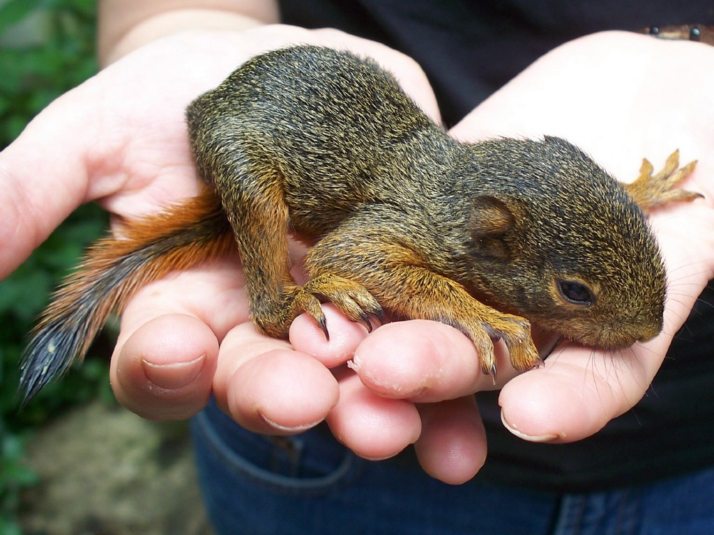 Especie recién nacida de ardilla género Sciurus, Henri Pittier, Venezuela